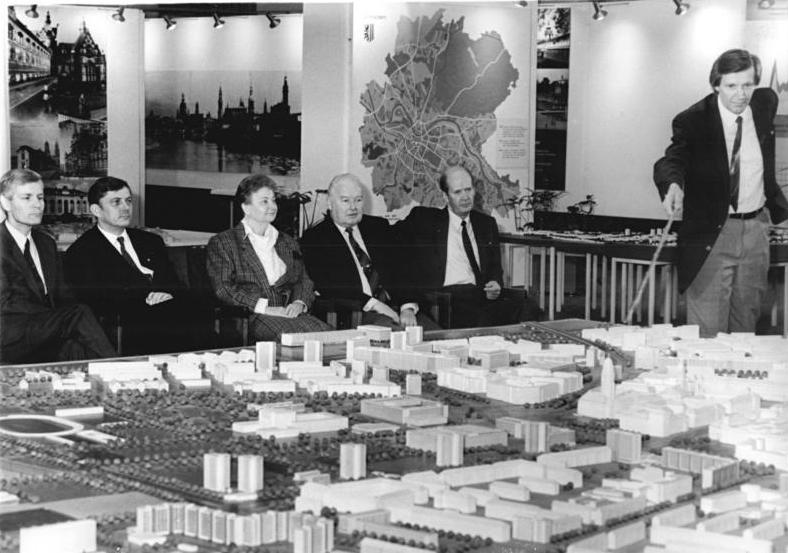 ADN-ZB-Hiekel-6.3.89-mx-Dresden: Voscherau-Besuch- Der Präsident des Senats und Erste Bürgermeister der Freien und Hansestadt Hamburg, Dr. Henning Voscherau (l.), besichtigte während seines Besuches in der Partnerstadt Dresden das Stadtmodell im Rathaus. In Anwesenheit von Dresdens Oberbürgermeister Wolfgang Berghofer (2.v.l.) erläuterte Stadtarchitekt Dr. Heinz Michalk den Wiederaufbau des vor 44 Jahren beim Bombenangriff zerstörten Elbflorenz.